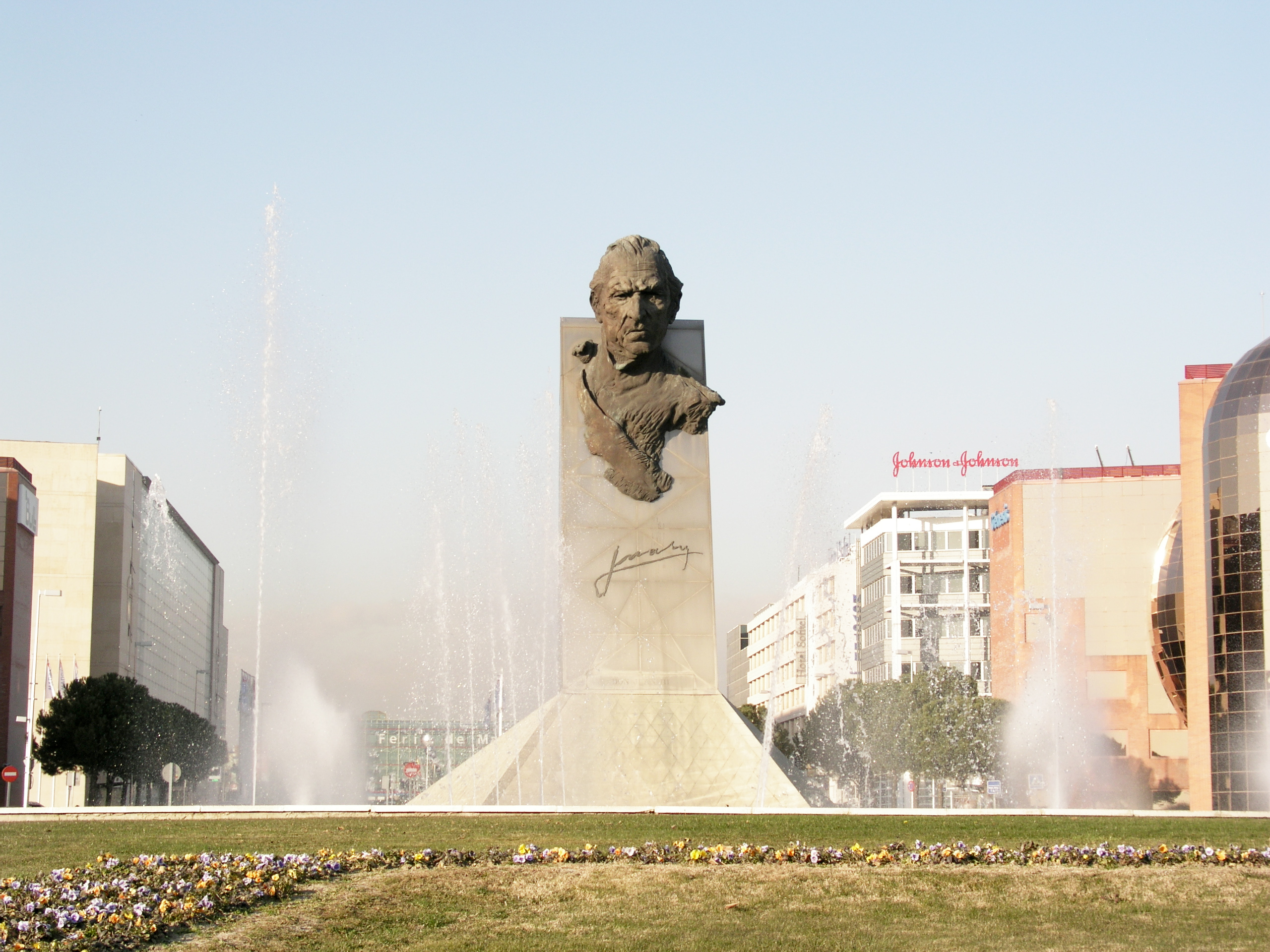 Parque Juan Carlos I, at entrance, Madrid, Spain. Monumento a Don Juan by Víctor Ochoa